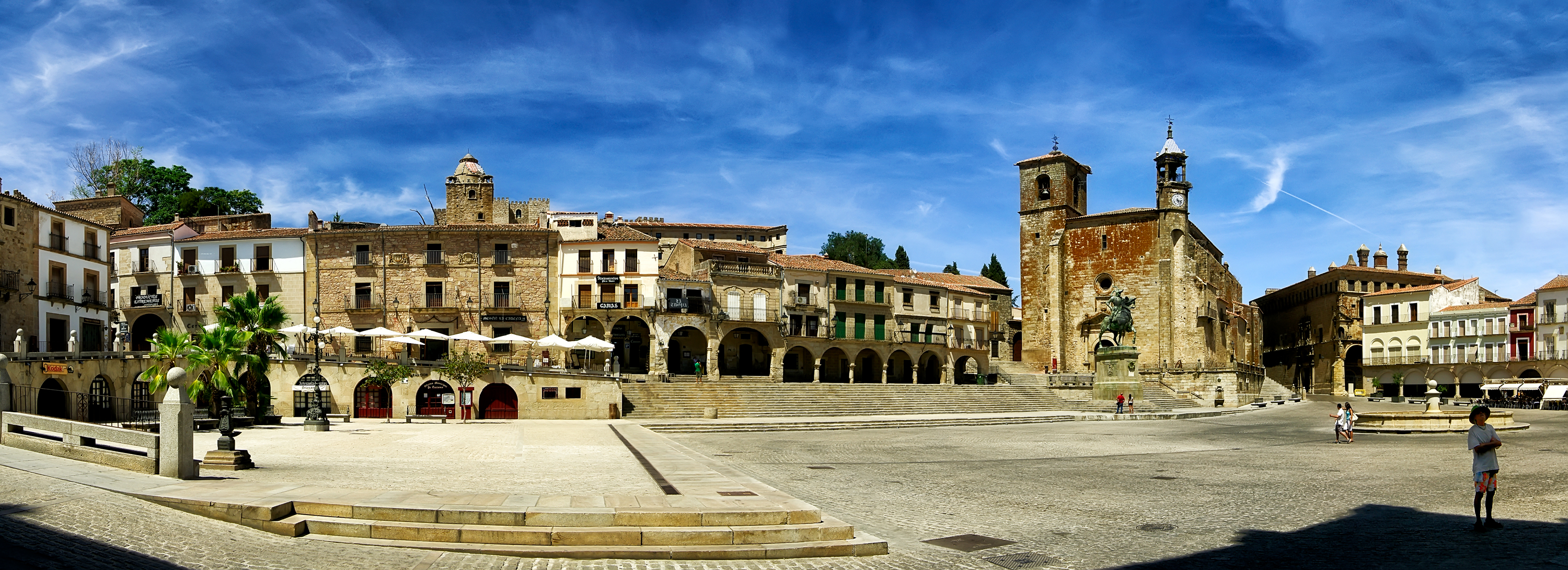 Panorámica de la Plaza Mayor de Trujillo Cáceres. Comunidad Autónoma de Extremadura.